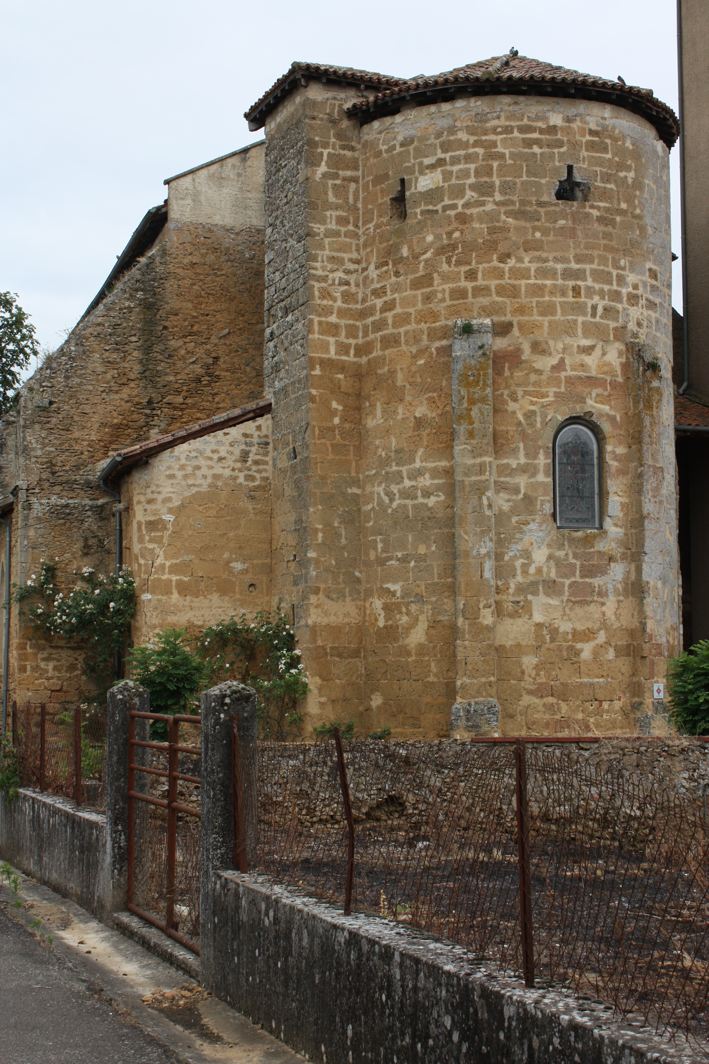 Panjas - Eglise Saint-Laurent Abside